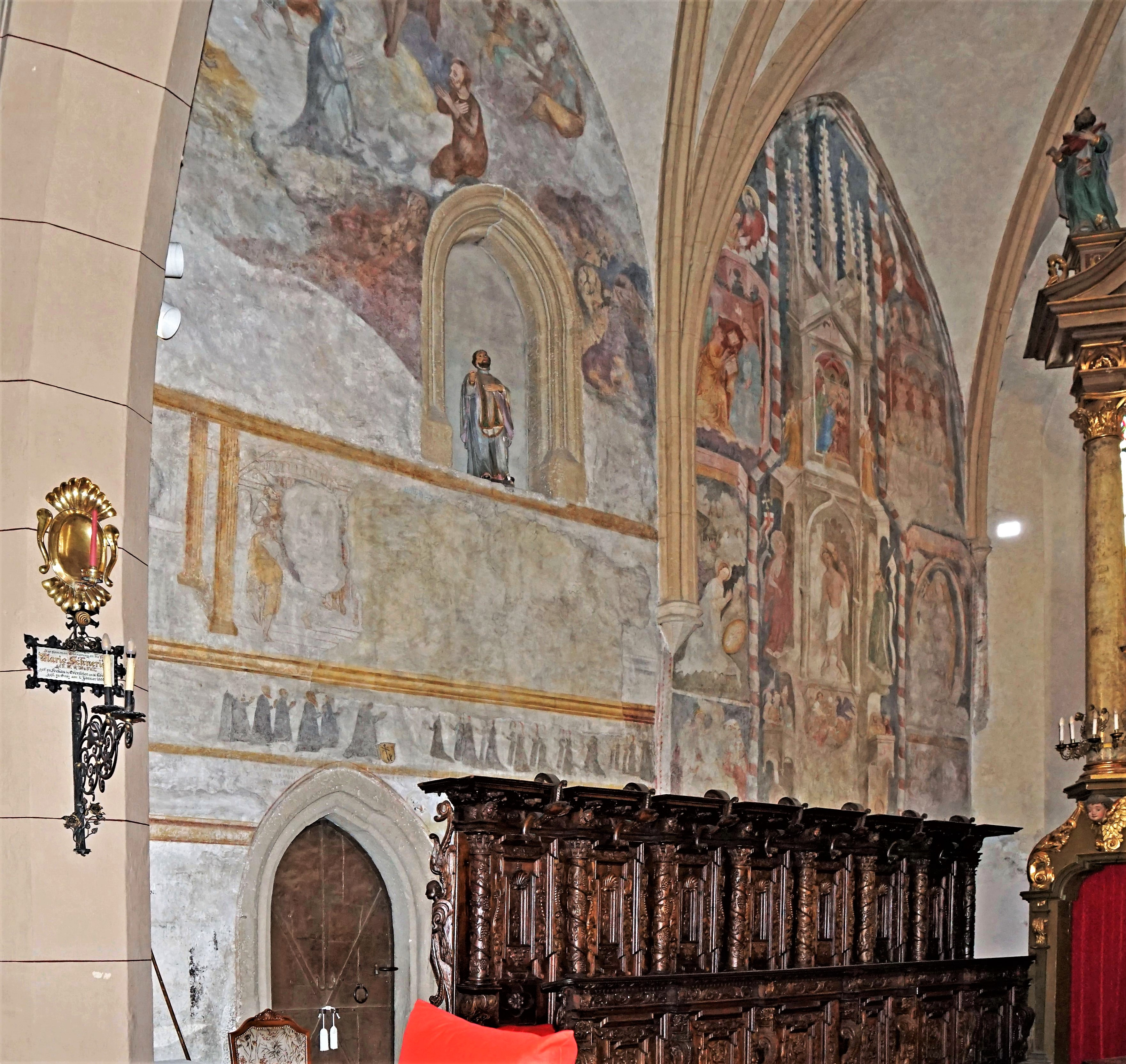 Pfarrkirche St. Peter und Paul (Tarvis), linke Wand des Chores mit Fresken des 16. Jahrhunderts